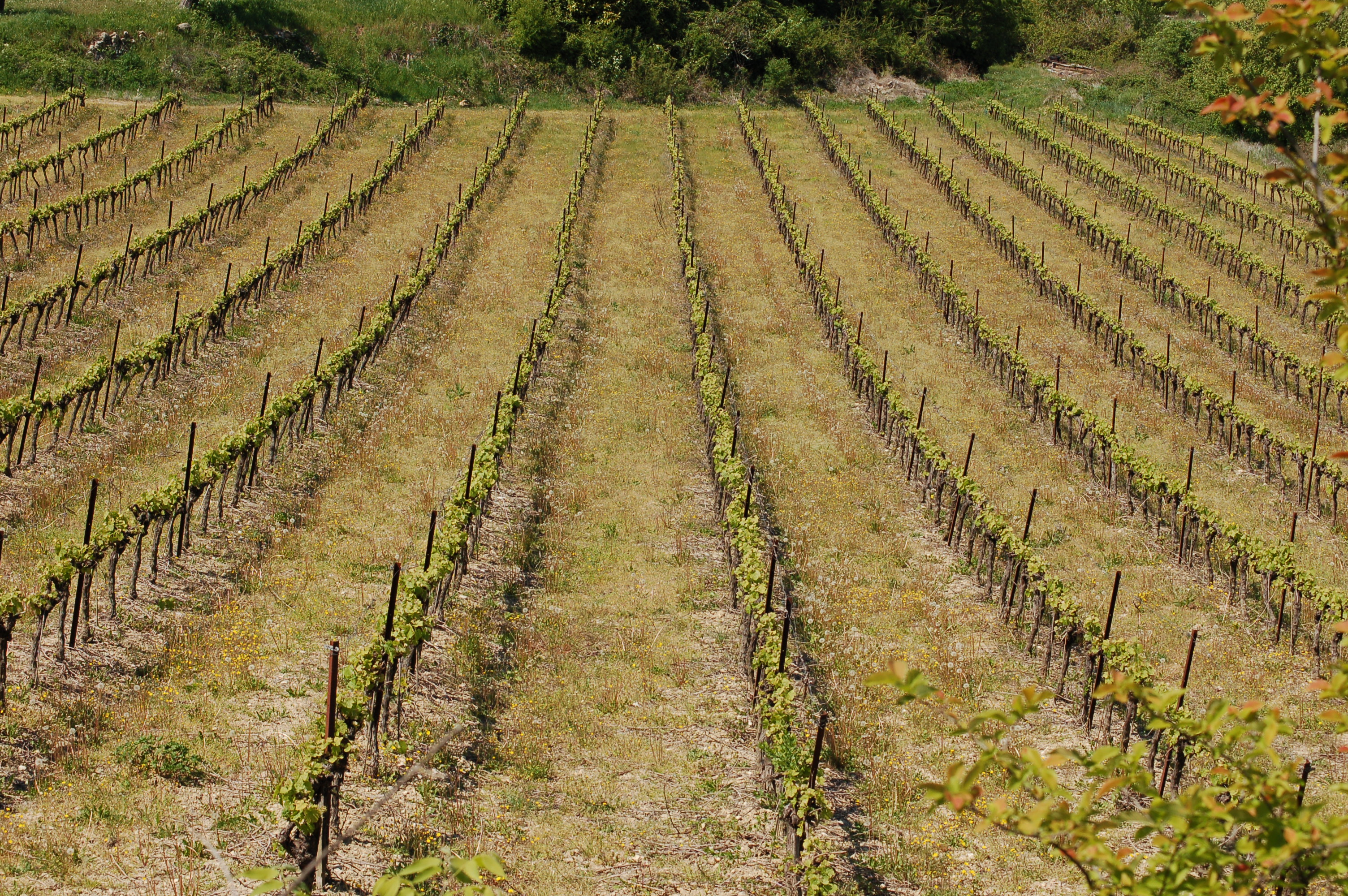 Vignoble des Côtes du Vivarais à Lagorce